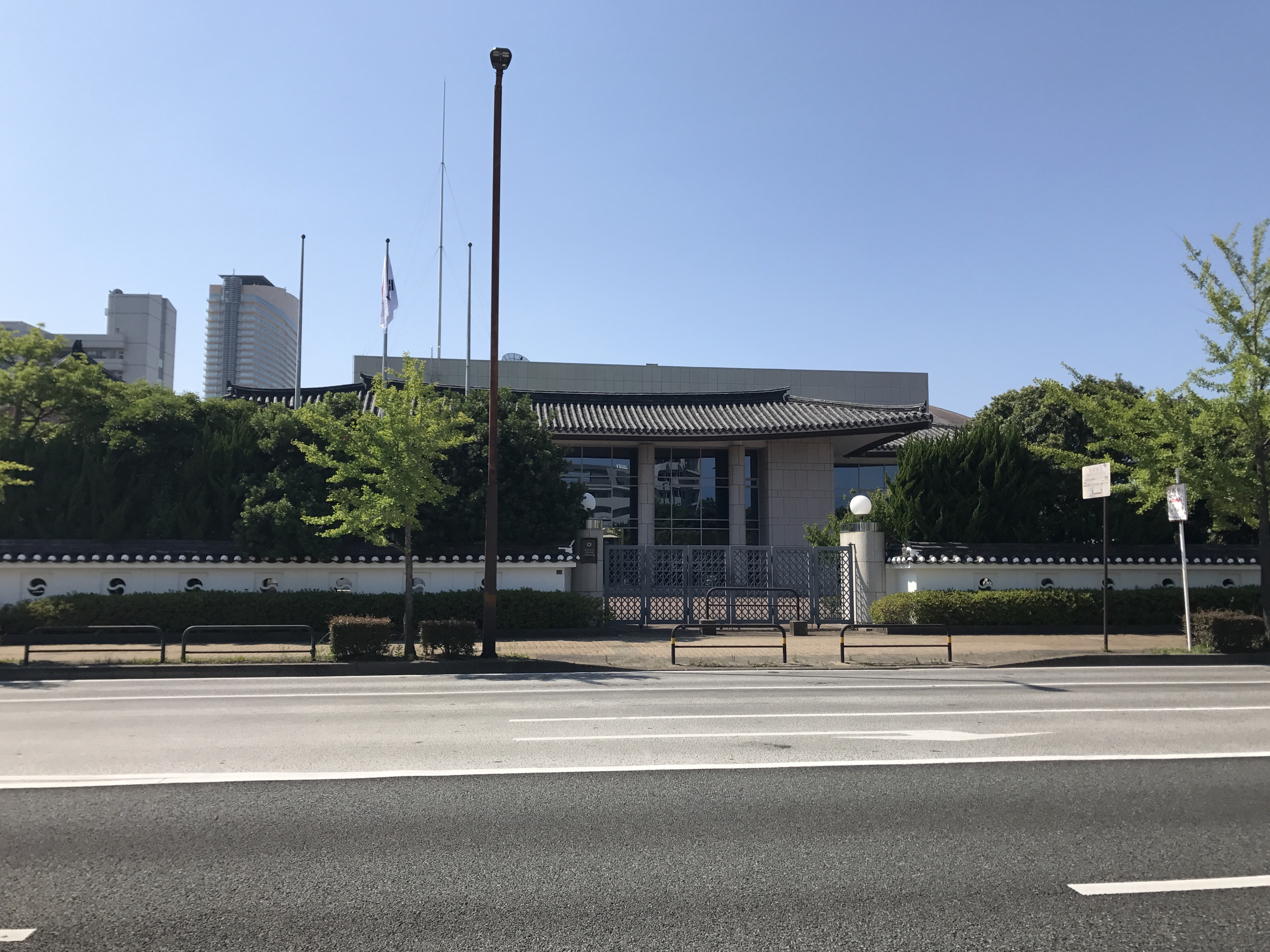 在福岡韓国総領事館